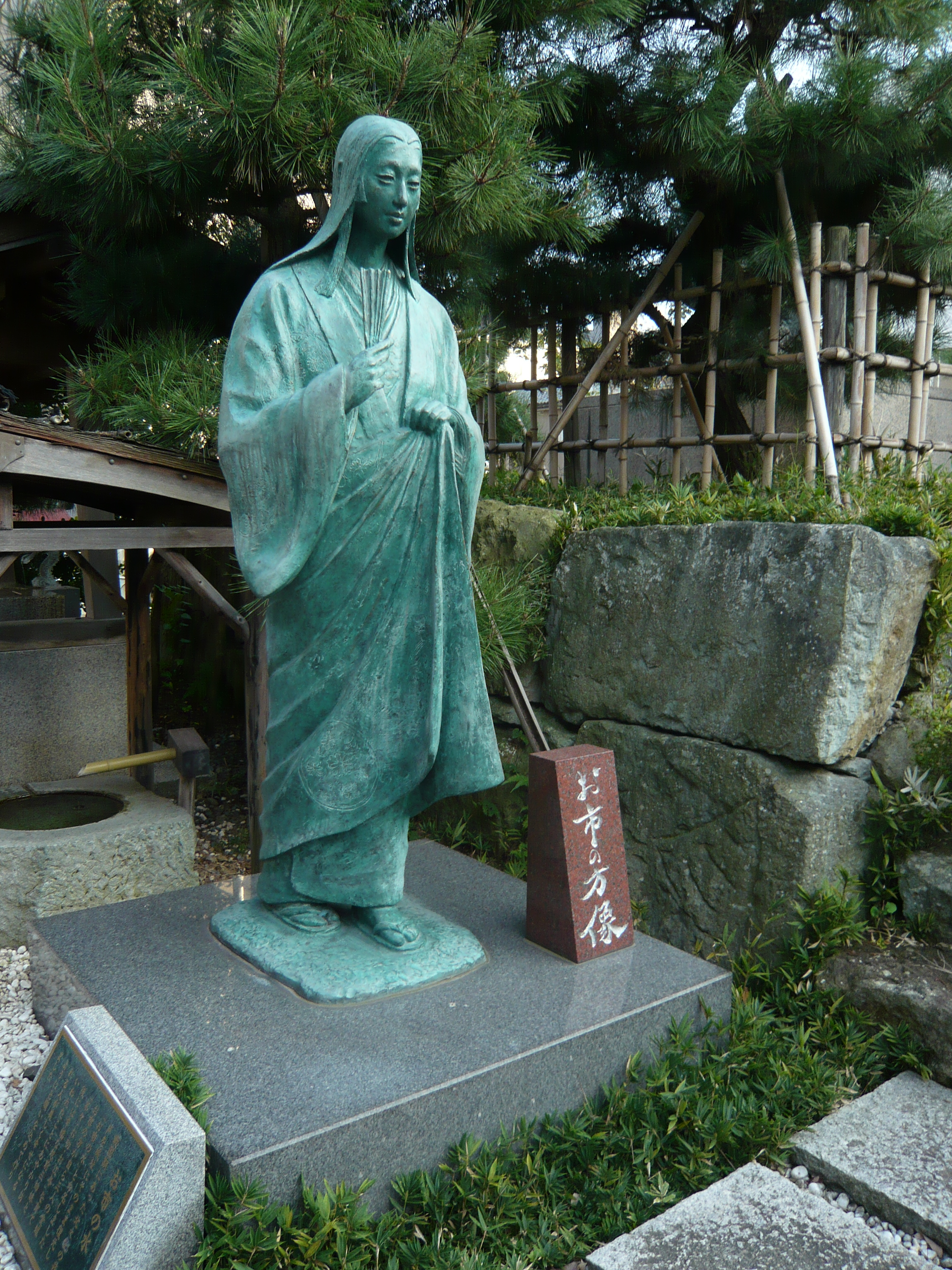 The Statue of Oichi-no-kata in Shibata-jinja, Fukui, Fukui, Japan 柴田神社境内 お市の方像（福井県福井市）